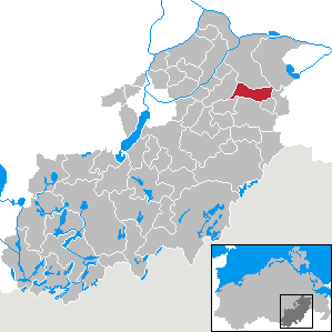 Schönbeck in Mecklenburg-Vorpommern, Landkreis Mecklenburg-Strelitz